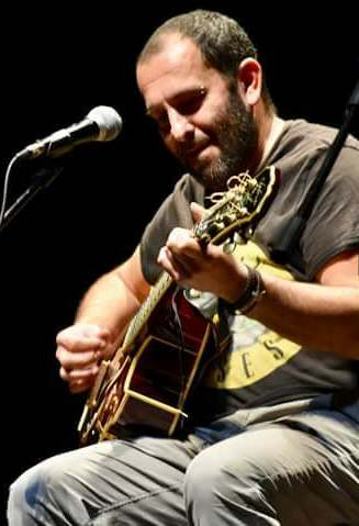 lo scrittore italiano Cristiano Cavina